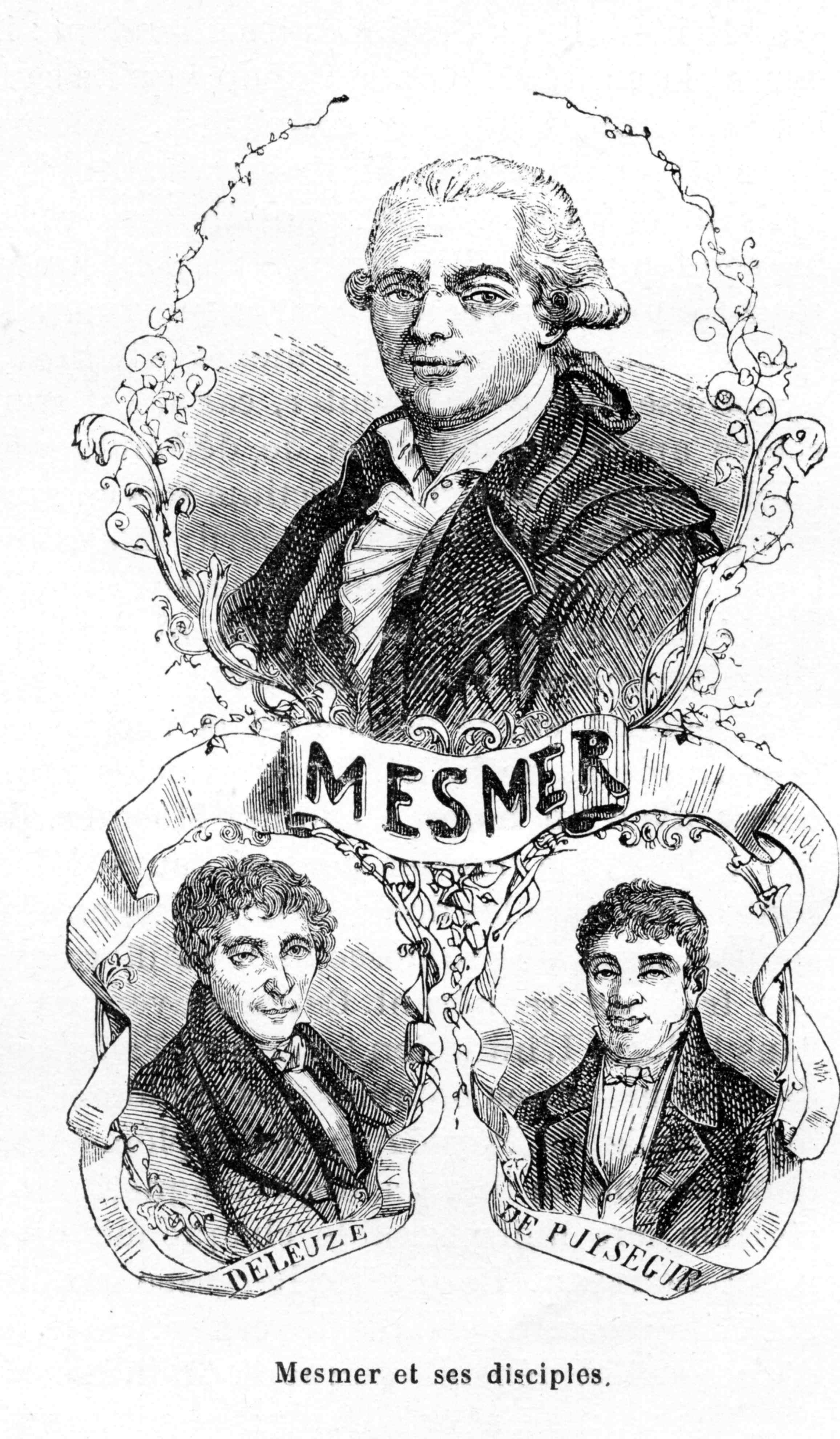 Franz Anton Mesmer et ses disciples Joseph Philippe François Deleuze et Armand Marie Jacques de Chastenet de Puységur